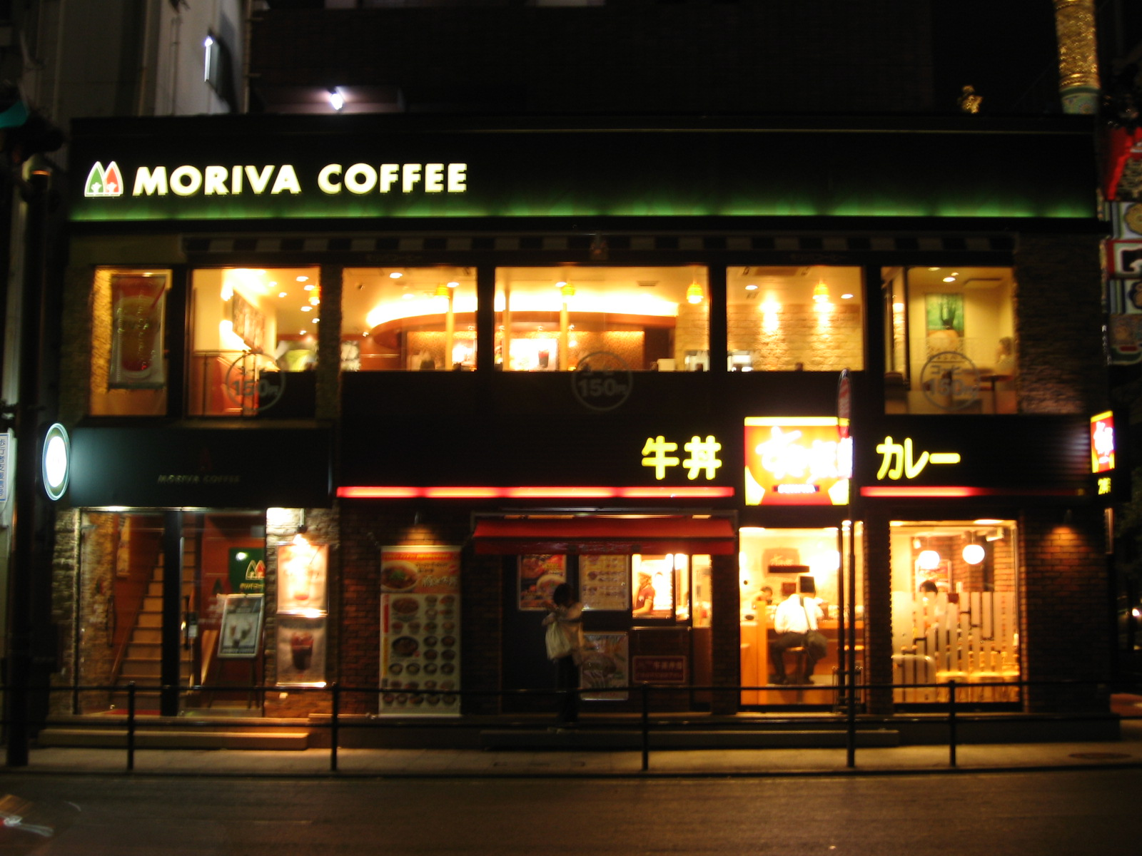 ゼンショー直営のカフェ店チェーン「モリバコーヒー」と牛丼店チェーン「すき家」が同じ建物に入居した形態の店舗。写真は横浜山下町店（神奈川県横浜市）。